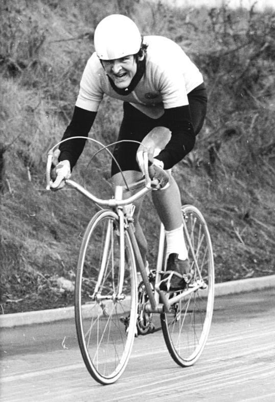 Falk Boden ADN-ZB Ludwig 24.4.81 Erfurt: VII. Thüringen-Rundfahrt-2. Etappe- Mit großem Einsatz stürmt der 21jährige Falk Boden (ASK Vorswärts Frankfurt-Oder) dem Ziel entgegen. Nach 44,31 min sicherte er sich den Sieg des 35-km-Einzelfahrens von Erfurt nach Dachwig und zurück. Damit stand gleichzeitig sein neunter Erfolg der diesjährigen Rennsaison fest.